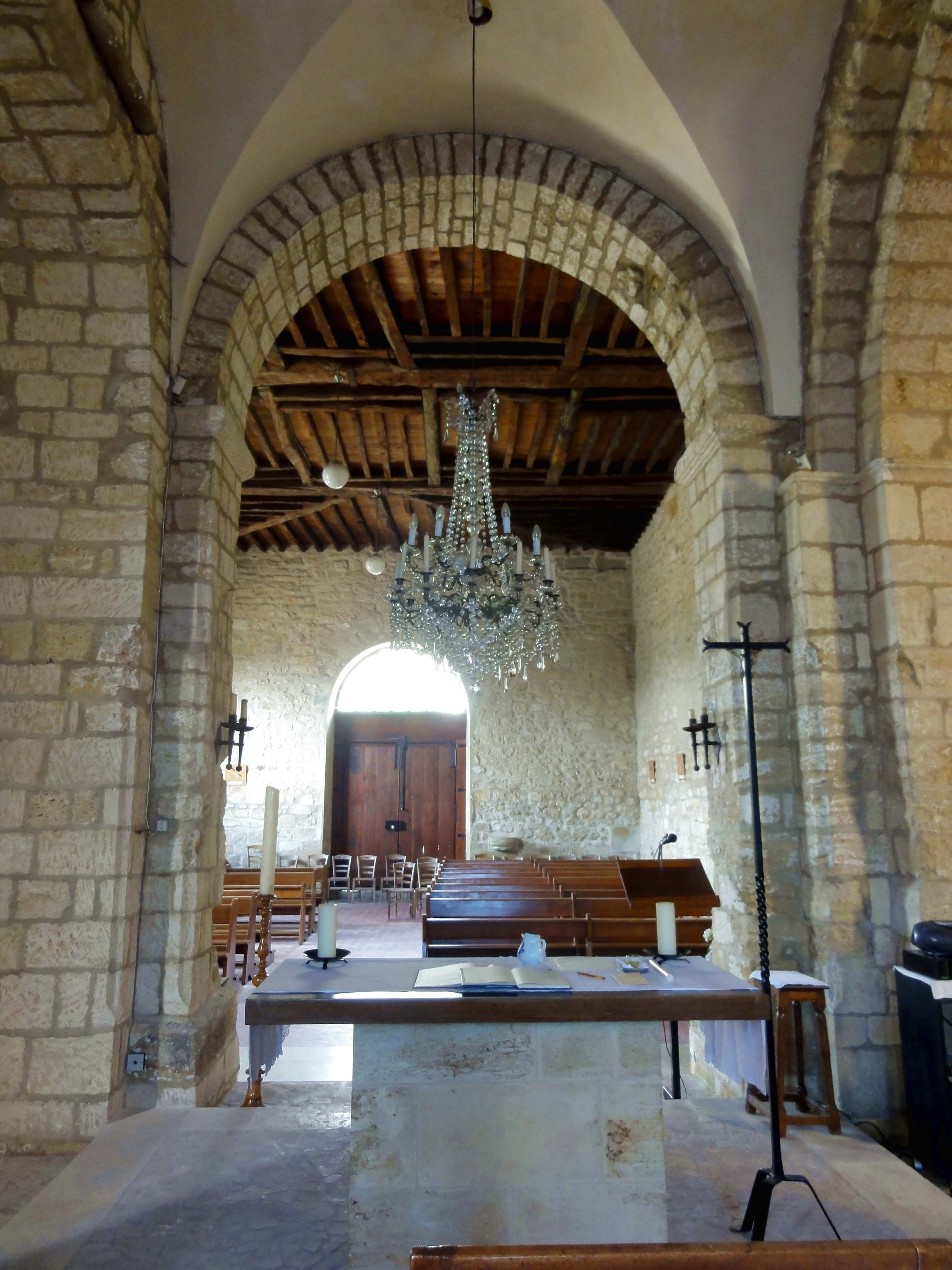 Intérieur de l'église (voir titre).